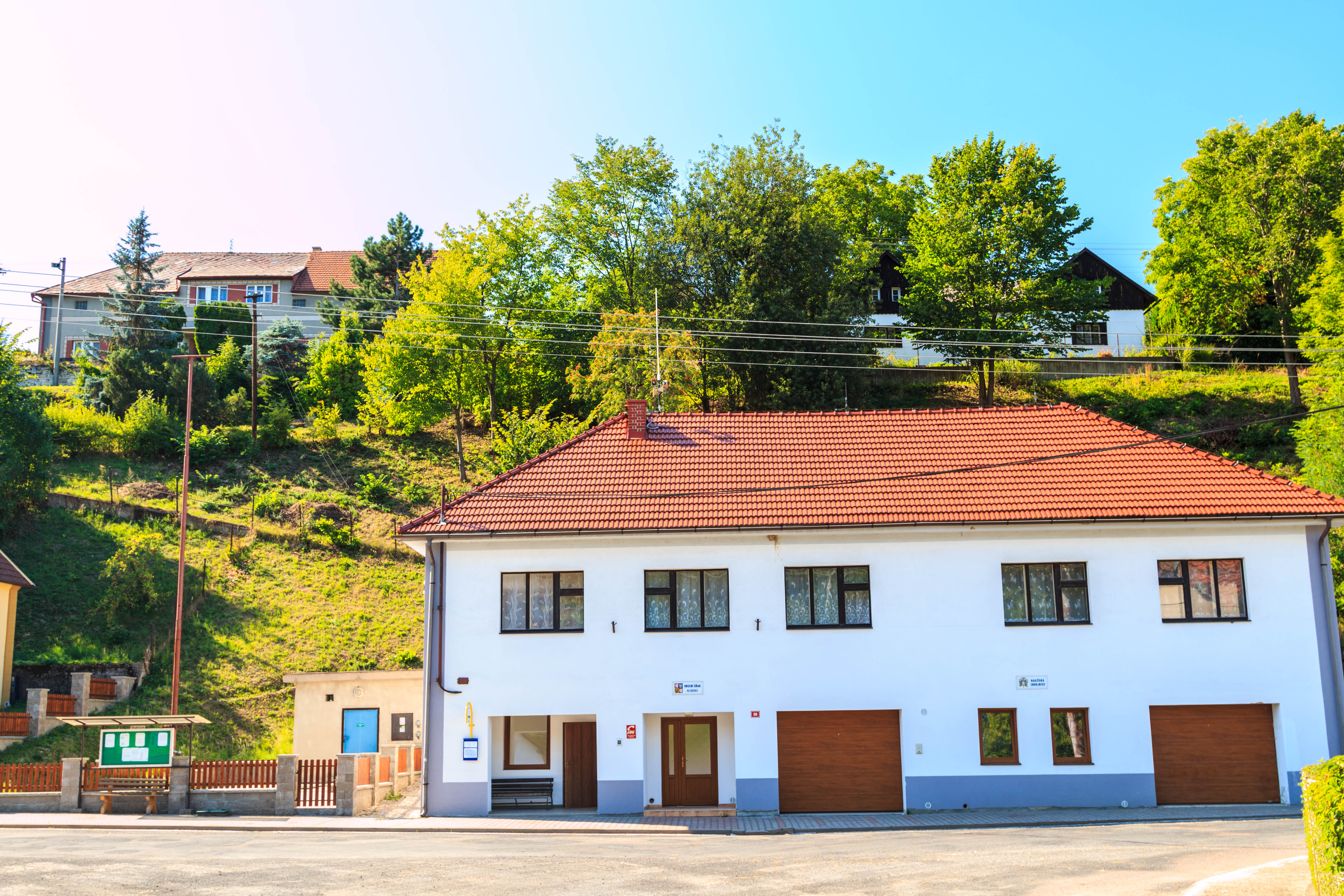 Hluboká obecní úřad